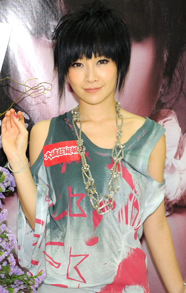 Jade Kwan 關心妍